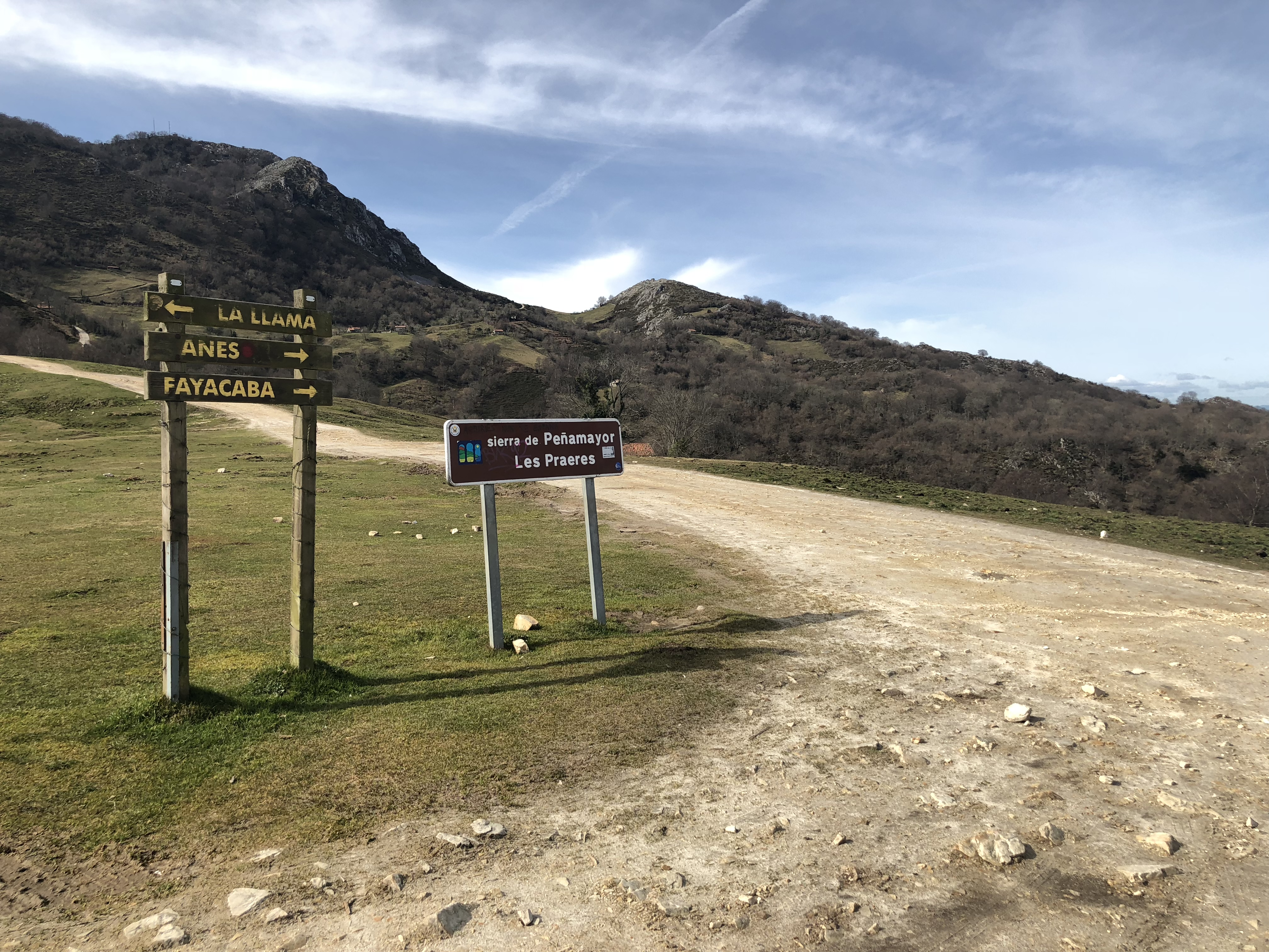 Praderas de Nava, en Asturias (España)